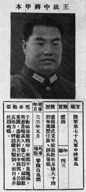 中文（台灣）: 抗戰軍人忠烈錄第一輯中的烈士遺像